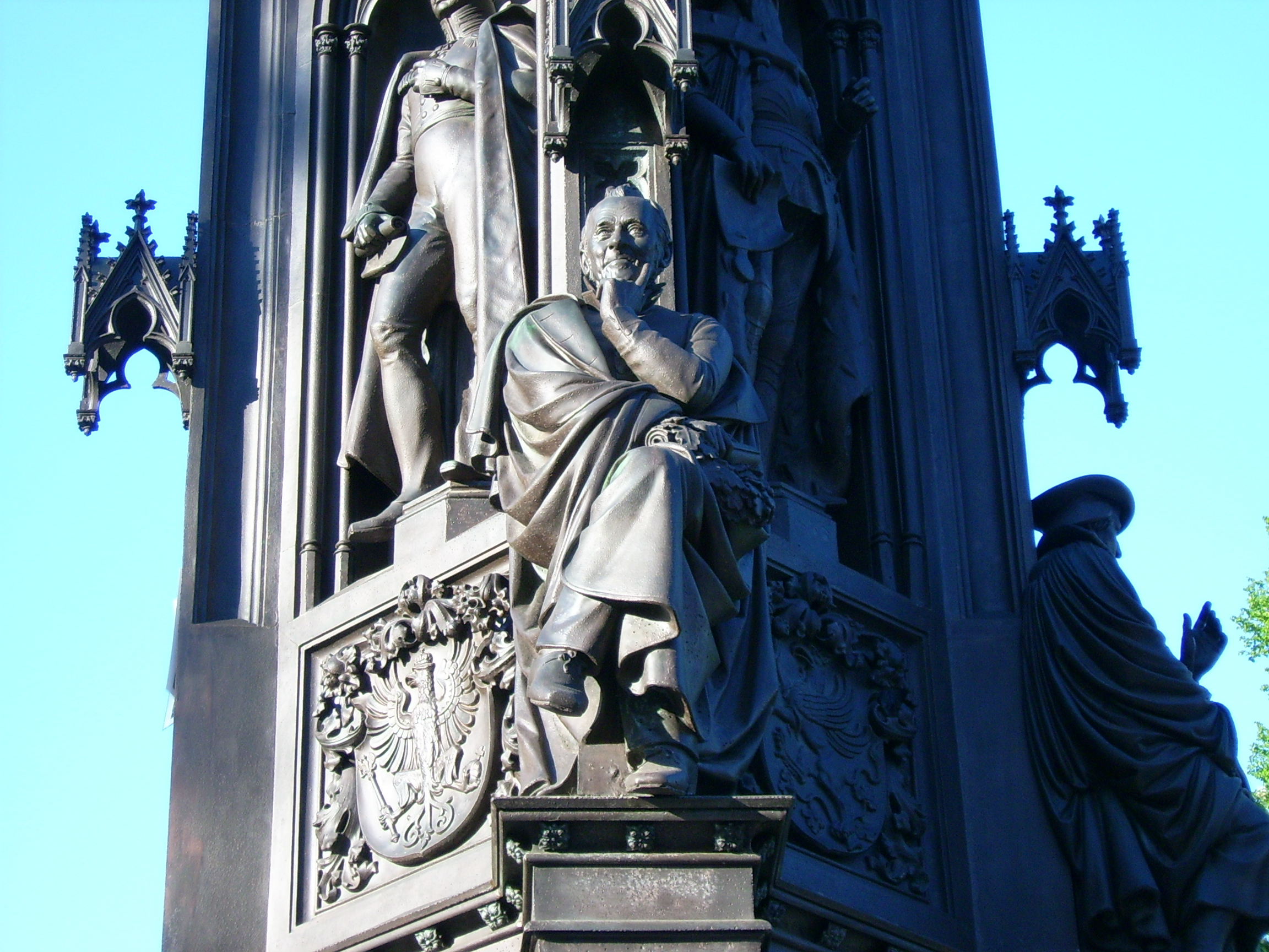 Figur Ernst Moritz Arndts auf dem Rubenowdenkmal in Greifswald